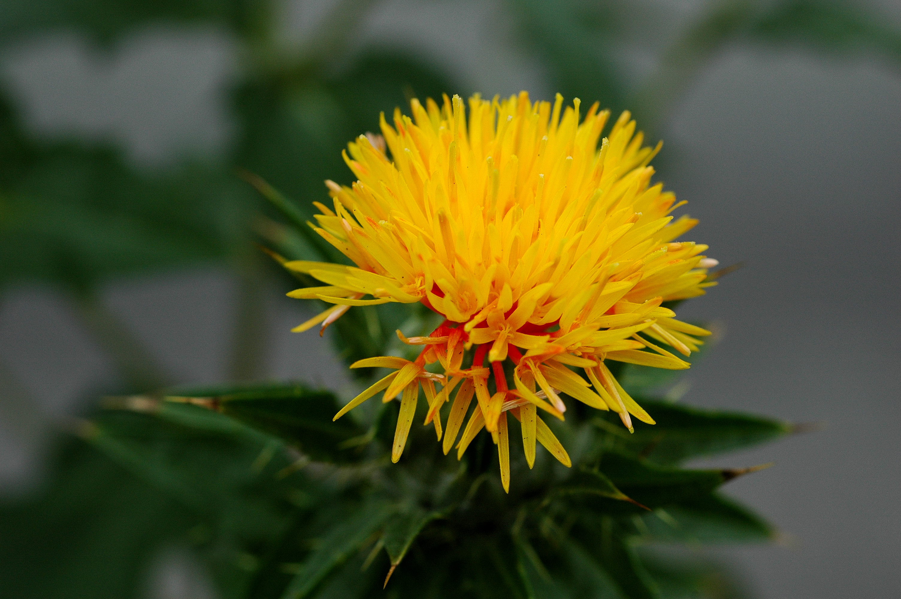 ベニバナの花 Carthamus tinctorius L.